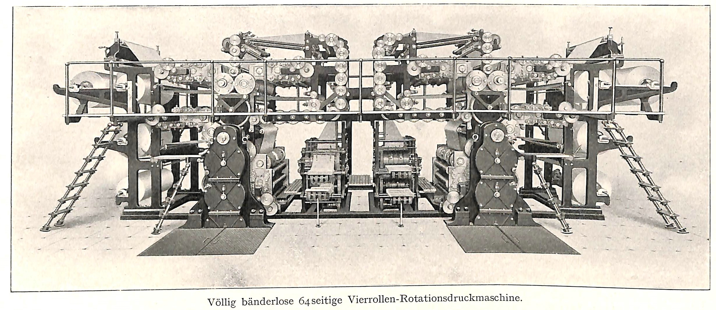 Plauen - Ansicht einer Rotationsdruckmaschine aus dem Fertigungsprogramm der Vogtl. Maschinenfabrik AG, vormals J.C. & H. Dietrich